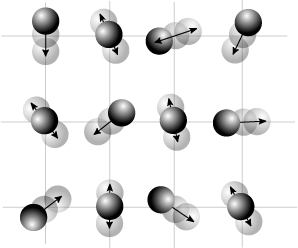 Molekylernas vibrationer i en kristallstruktur. De är fasta i gitterpunkterna och vibrerar med olika frekvenser p.g.a. termisk energi. Skapad av Rogper/Created by Rogper